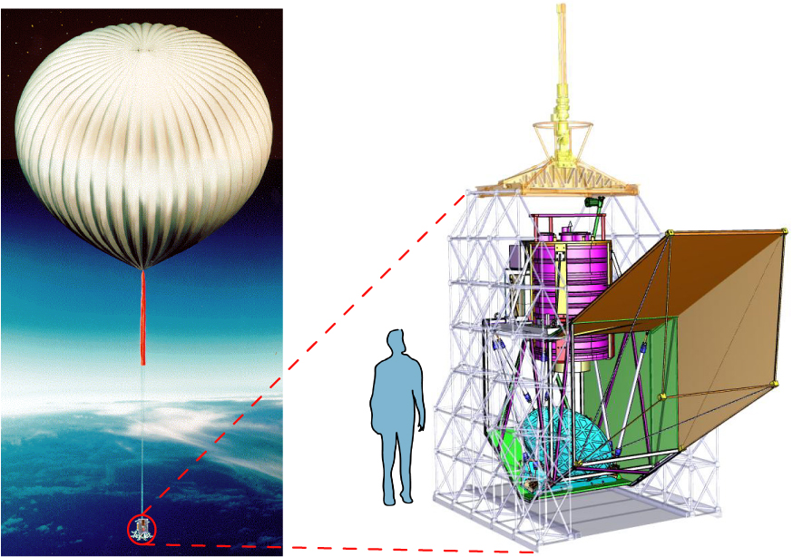 Vue générale de la mission PILOT